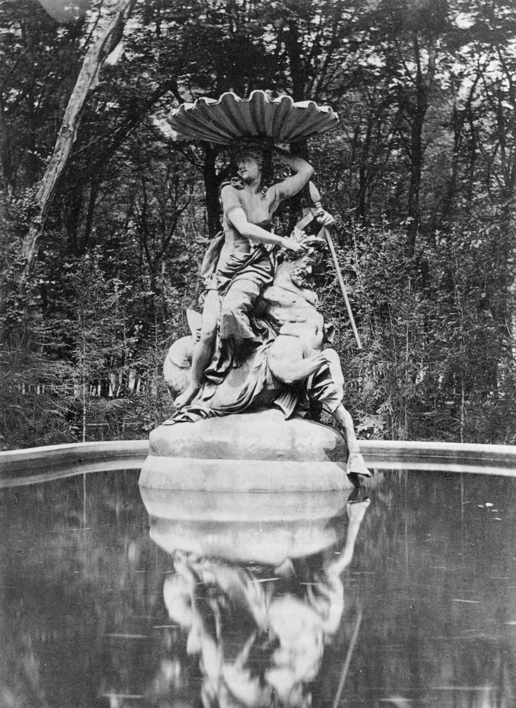 Figuren am Galatea-Brunnen